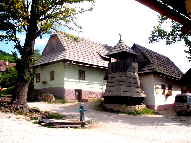 Vlkolinec pamiatka UNESCO 16